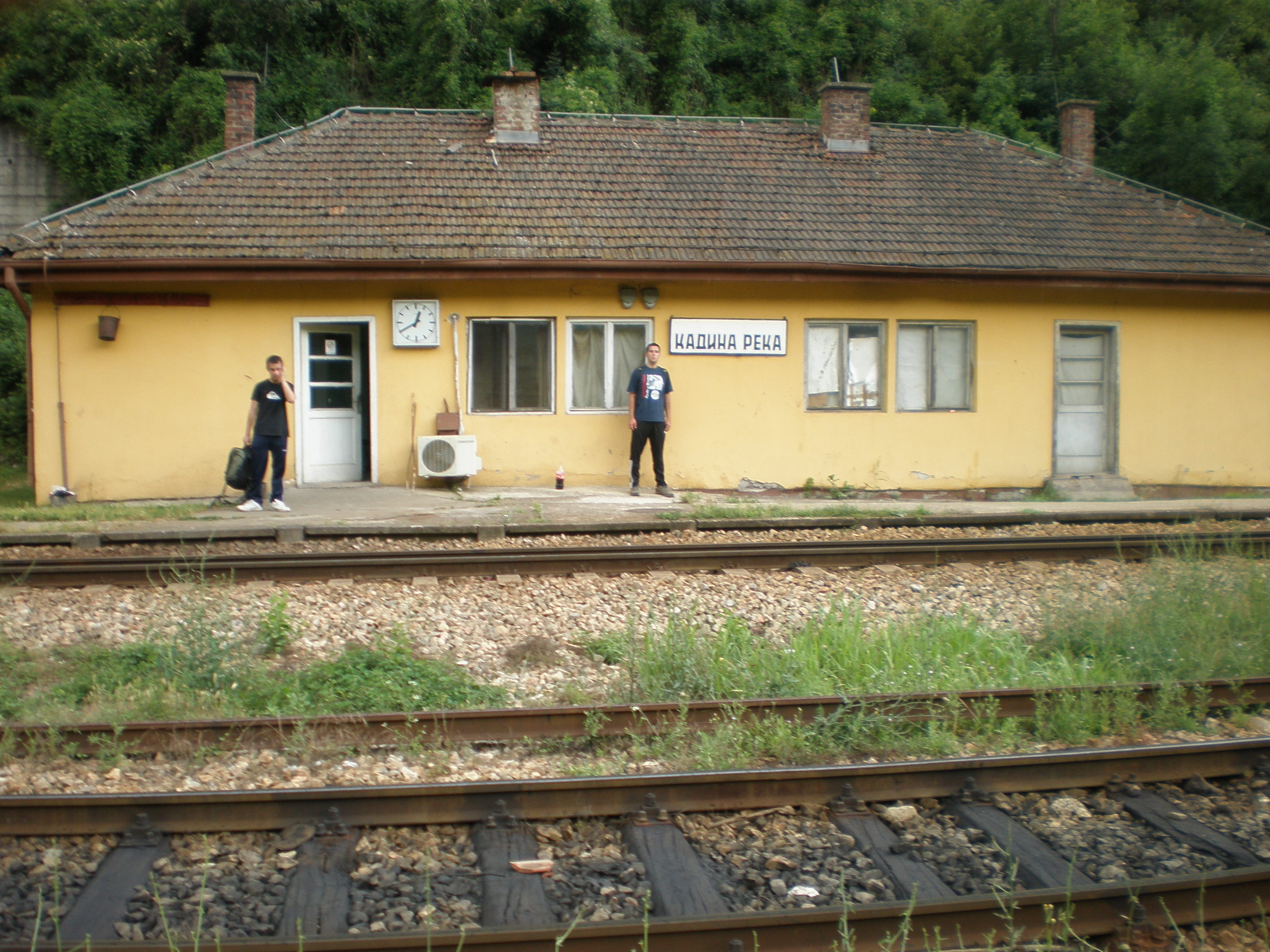 ЖС „Кадина Река“